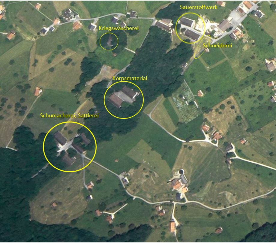 Grundwald, Grossteil, Giswil OW, Schweiz: 1988